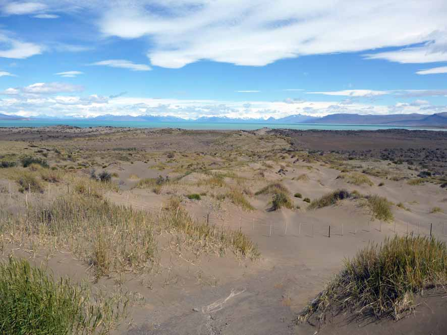 El Calafate